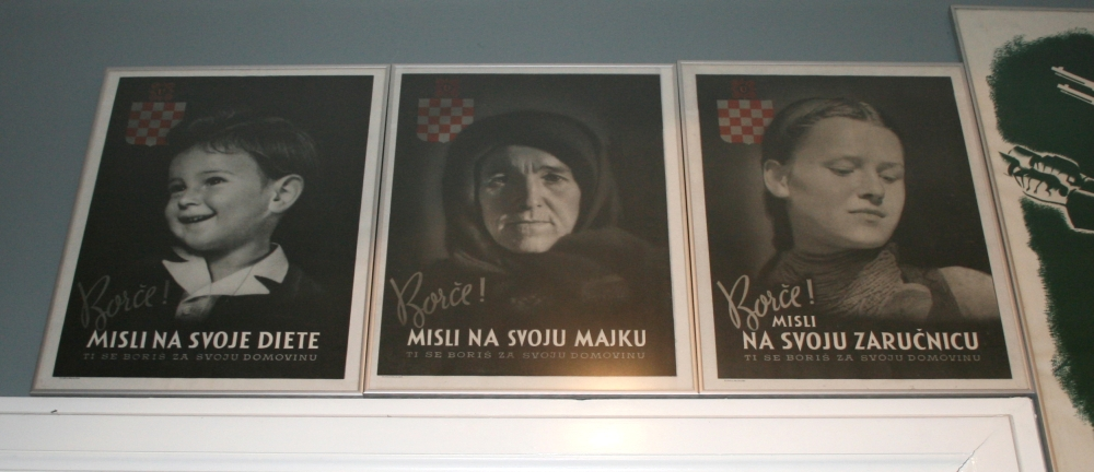 Plakati iz doba NDH u Muzeju grada Zagreba snimljen tijekom Noći muzeja